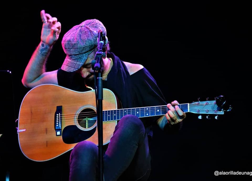 Lucas Masciano en directo